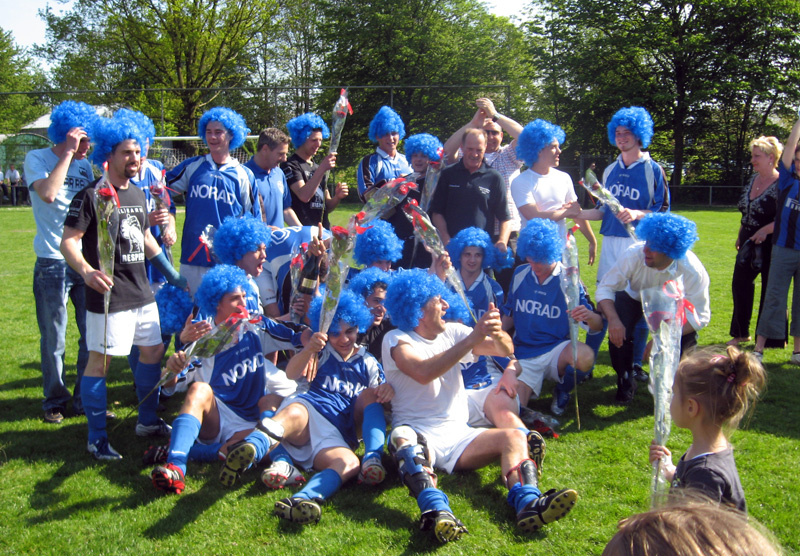 FC Hoensbroek. Foto genomen na de overwinning op haslou waardoor ze kampioen zijn geworden